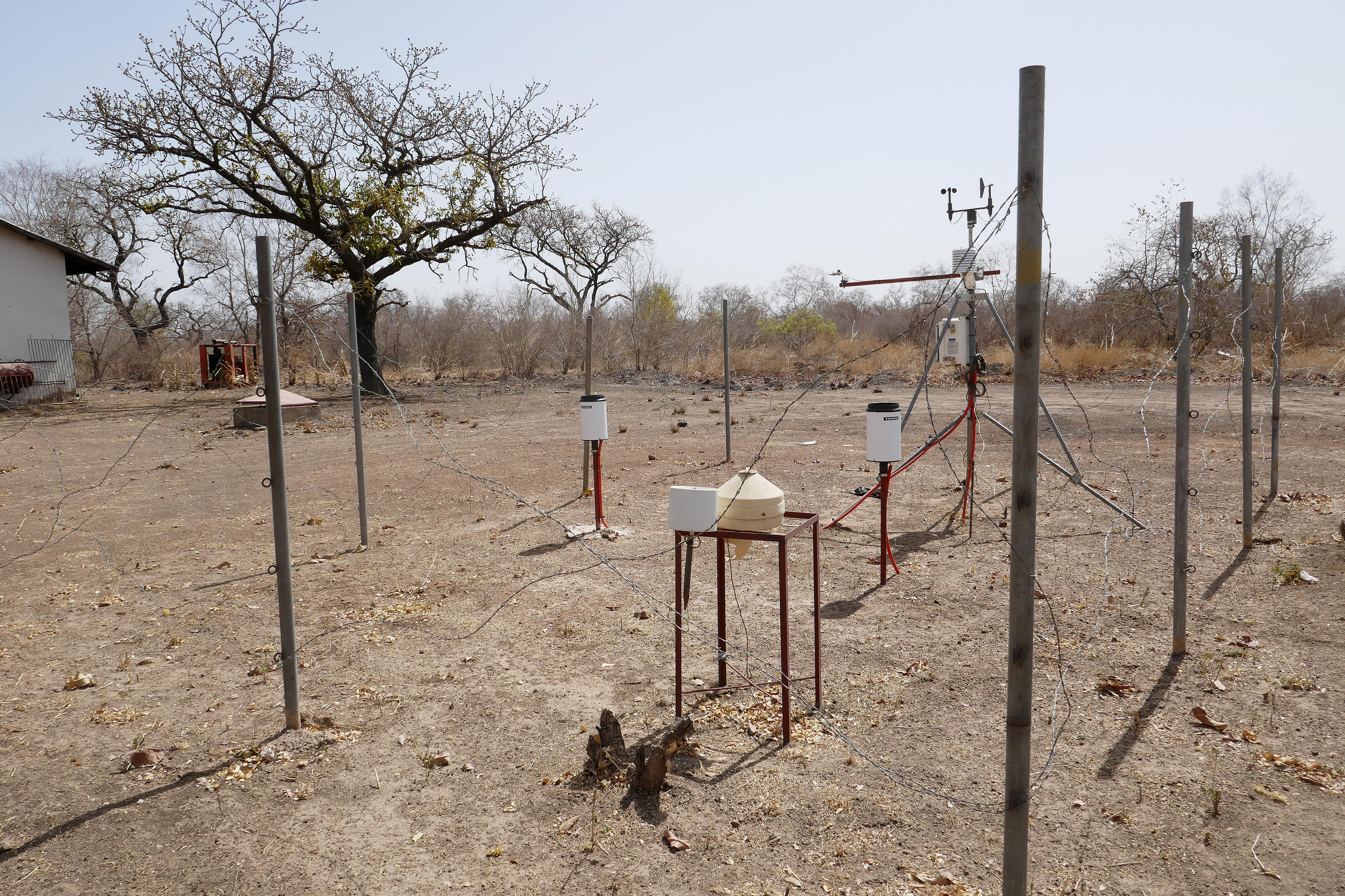 Parc national de la Pendjari (Bénin) : station météorologique, près de l'hôtel-campement.